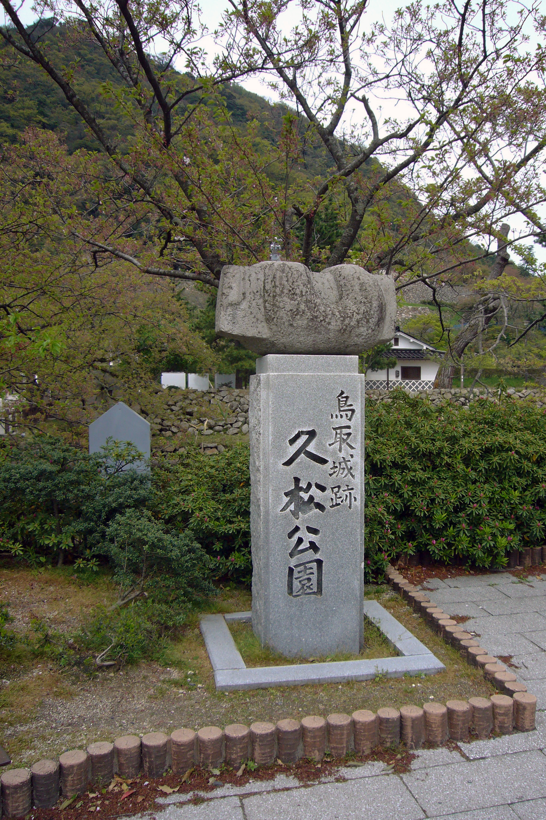 Tottori Castle in Tottori, Tottori prefecture, Japan